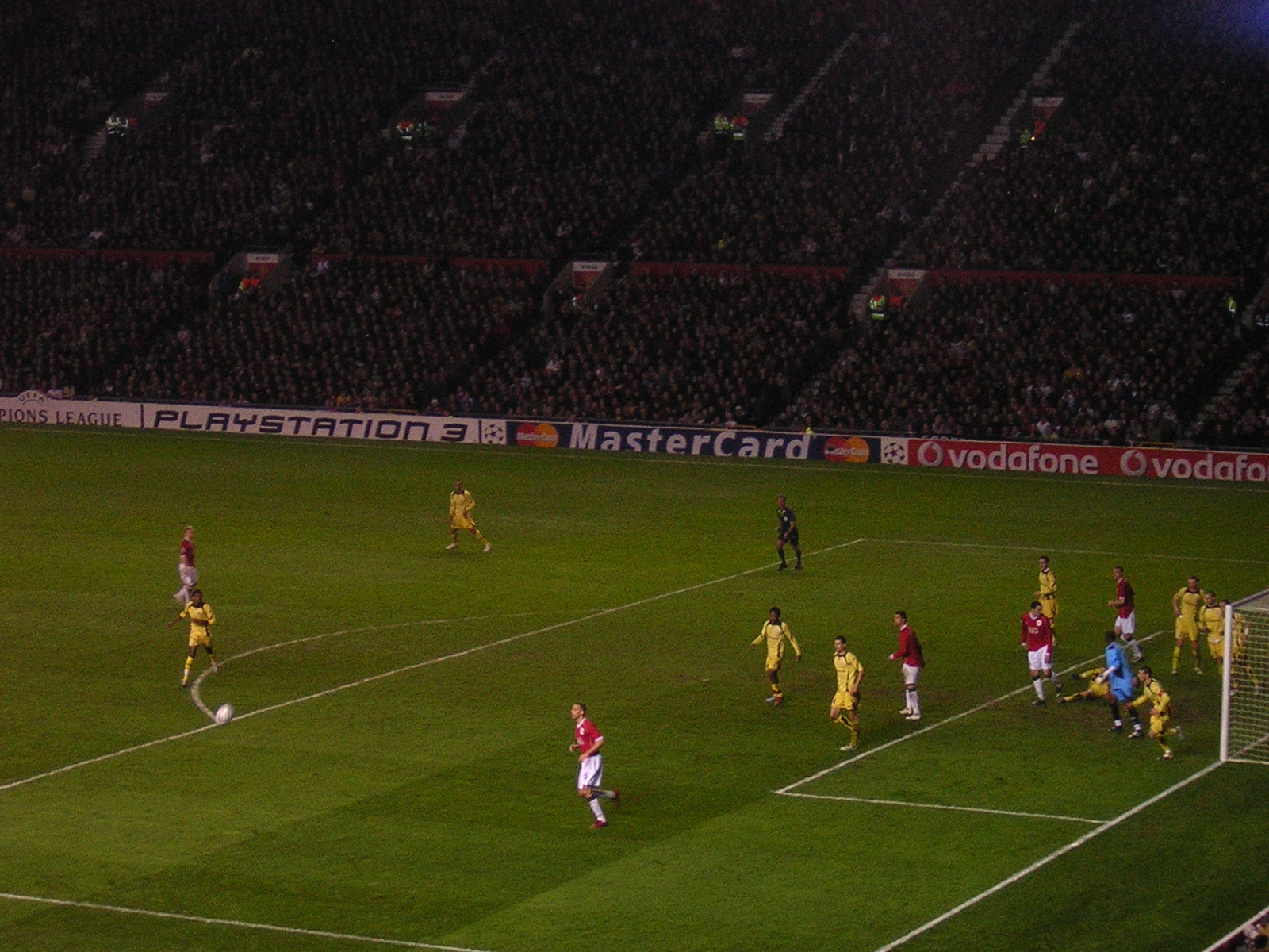 Huitième de finale retour Ligue des Champions 2006-2007.